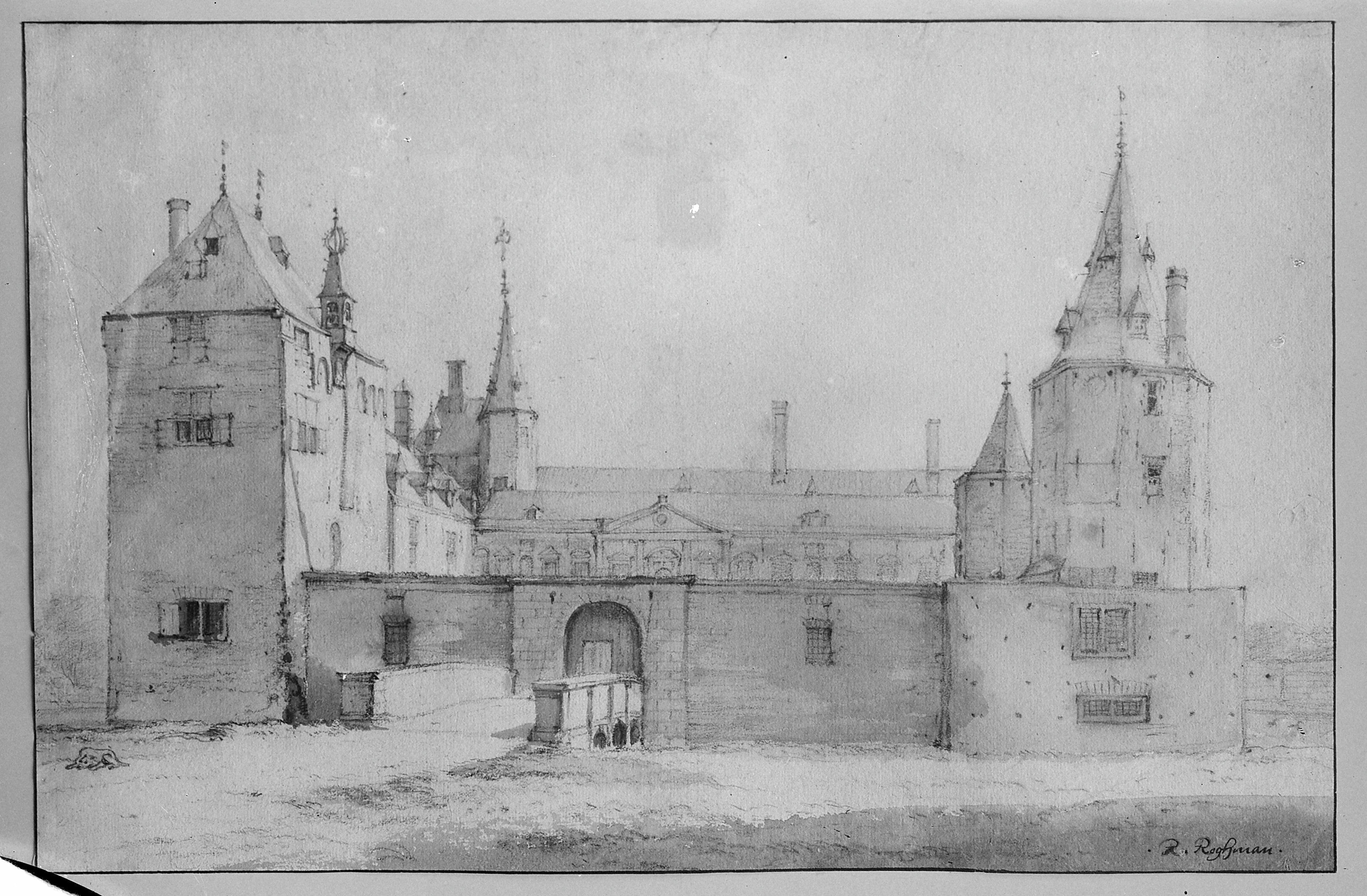 Huis Te Warmond: Pentekening van Roghman